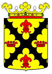 Wapen van de gemeente Hoogland.